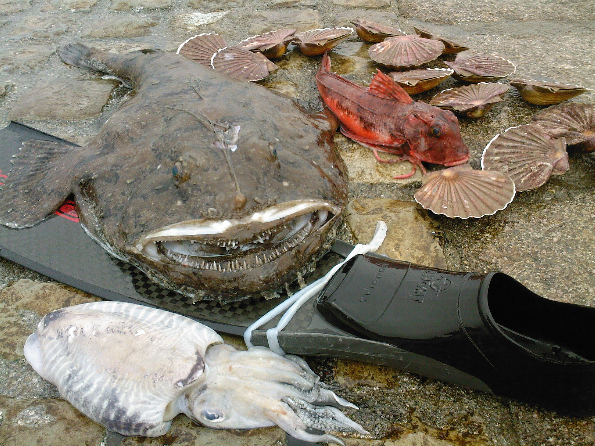 Pêche réalisée en chasse sous-marine, baudroie, rouget grondin, seiche et coquilles saint-jacques